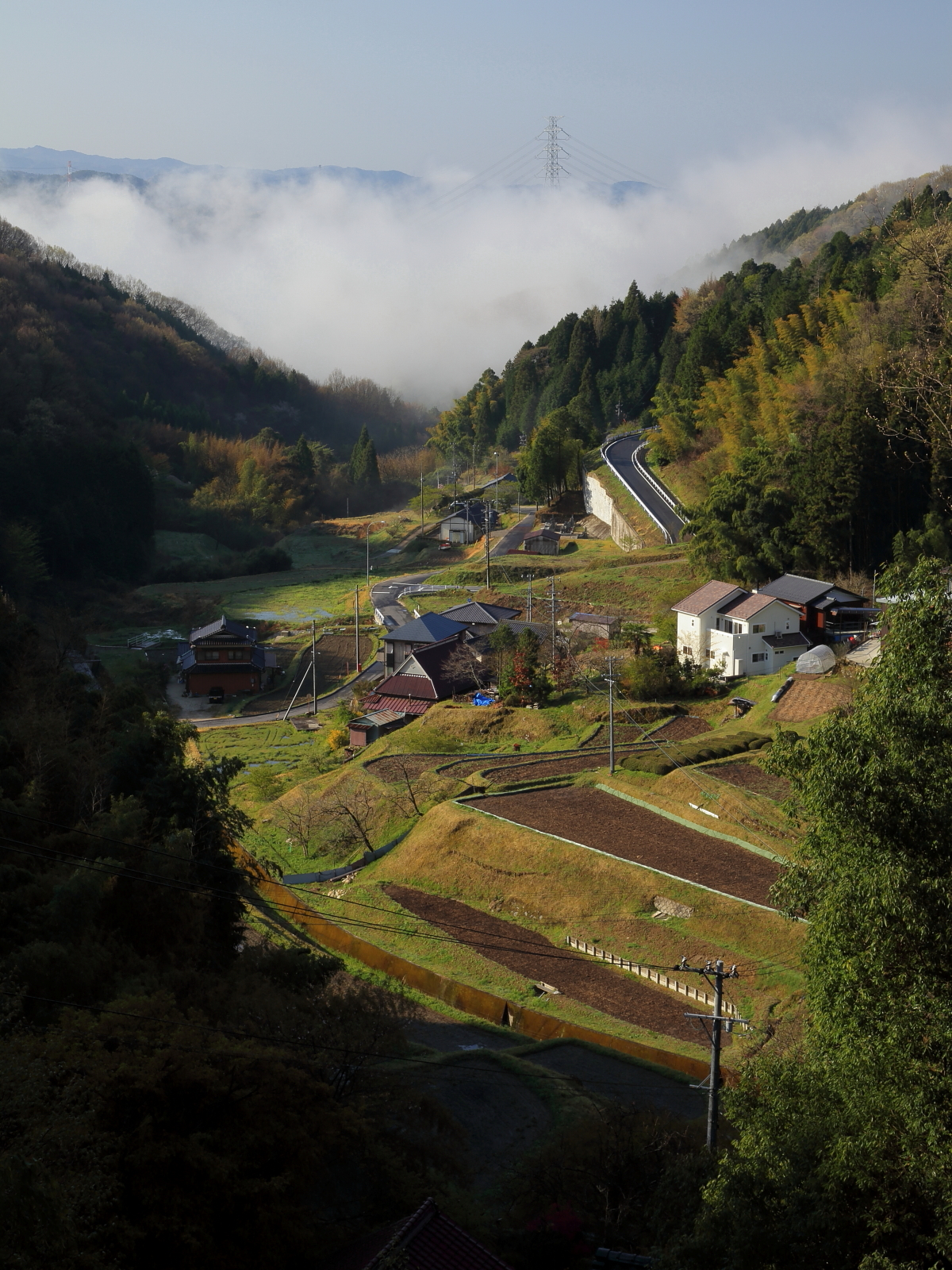 豊田市苅萱町・岩下町の風景（2011年（平成23年）4月）